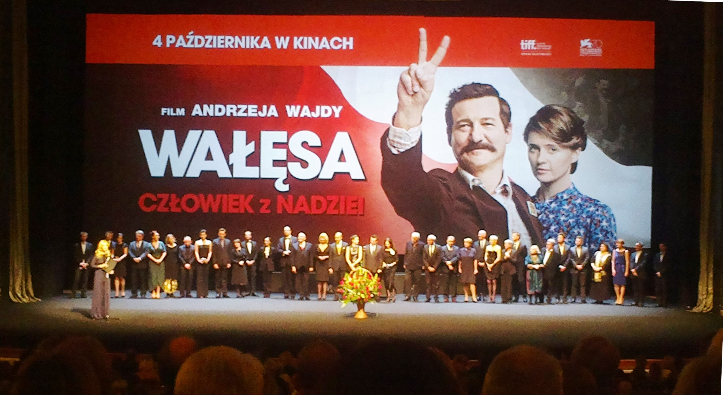 PL Wałęsa movie première in Grand Theatre in Warsaw